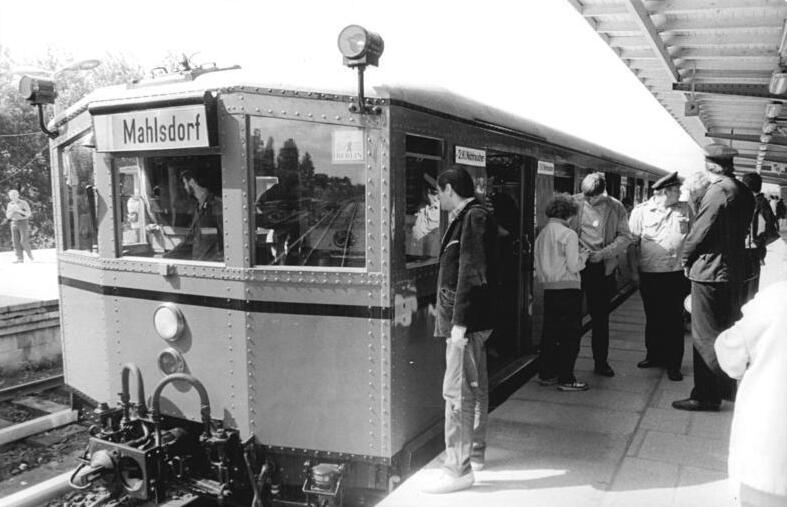 ADN-ZB Uhlemann 15.8.87 Berlin: Sonderfahrten der S-Bahn mit einem historischen Trieb- und Steuerwagen des Baujahres 1927-28 und einem S-Bahnmusterzug der Baureihe 270 zwischen den Bahnhöfen Alexanderplatz und Mahlsdorf lockten viele Schaulustige und Eisenbahnfreunde an. Im Abstand von 40 Minuten fuhren die Züge 12 Mal.